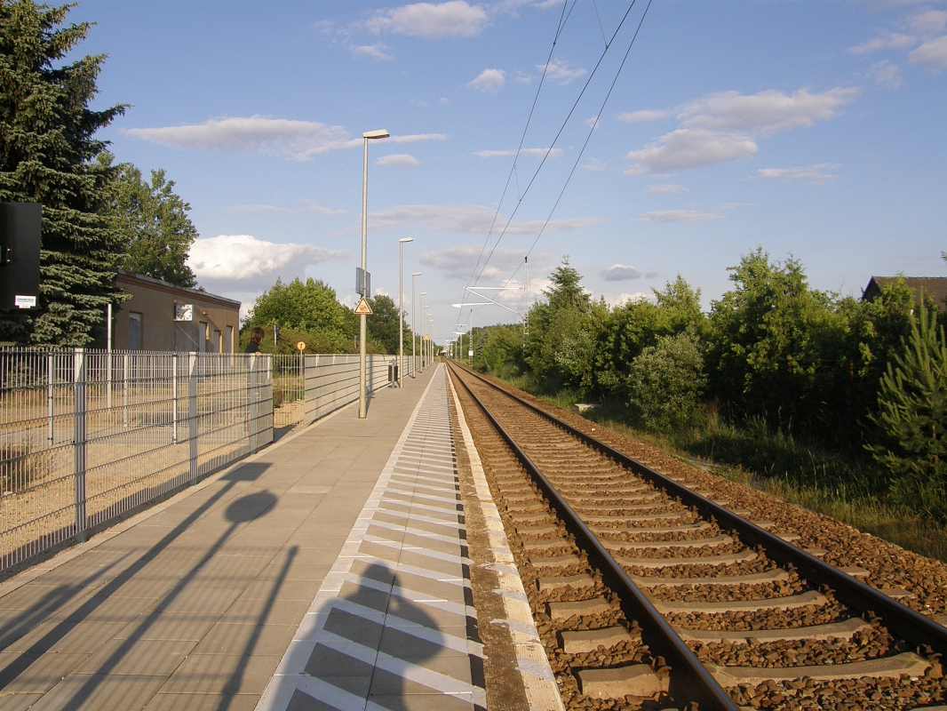 Kunersdorf